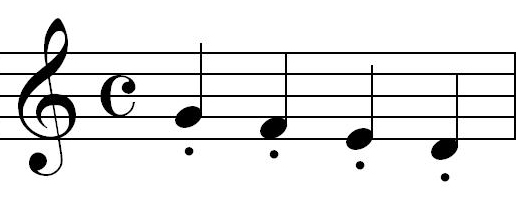 Staccato